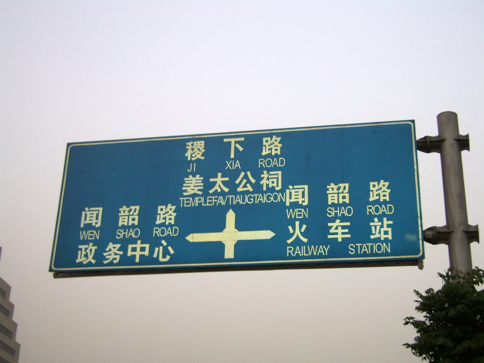 临淄路牌